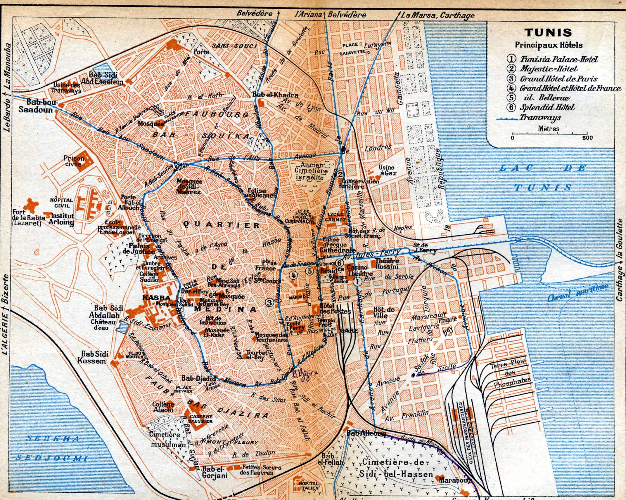 Plan de Tunis en 1916, Tunisie